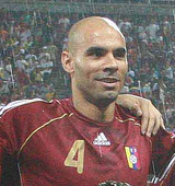 Jonay Hernández